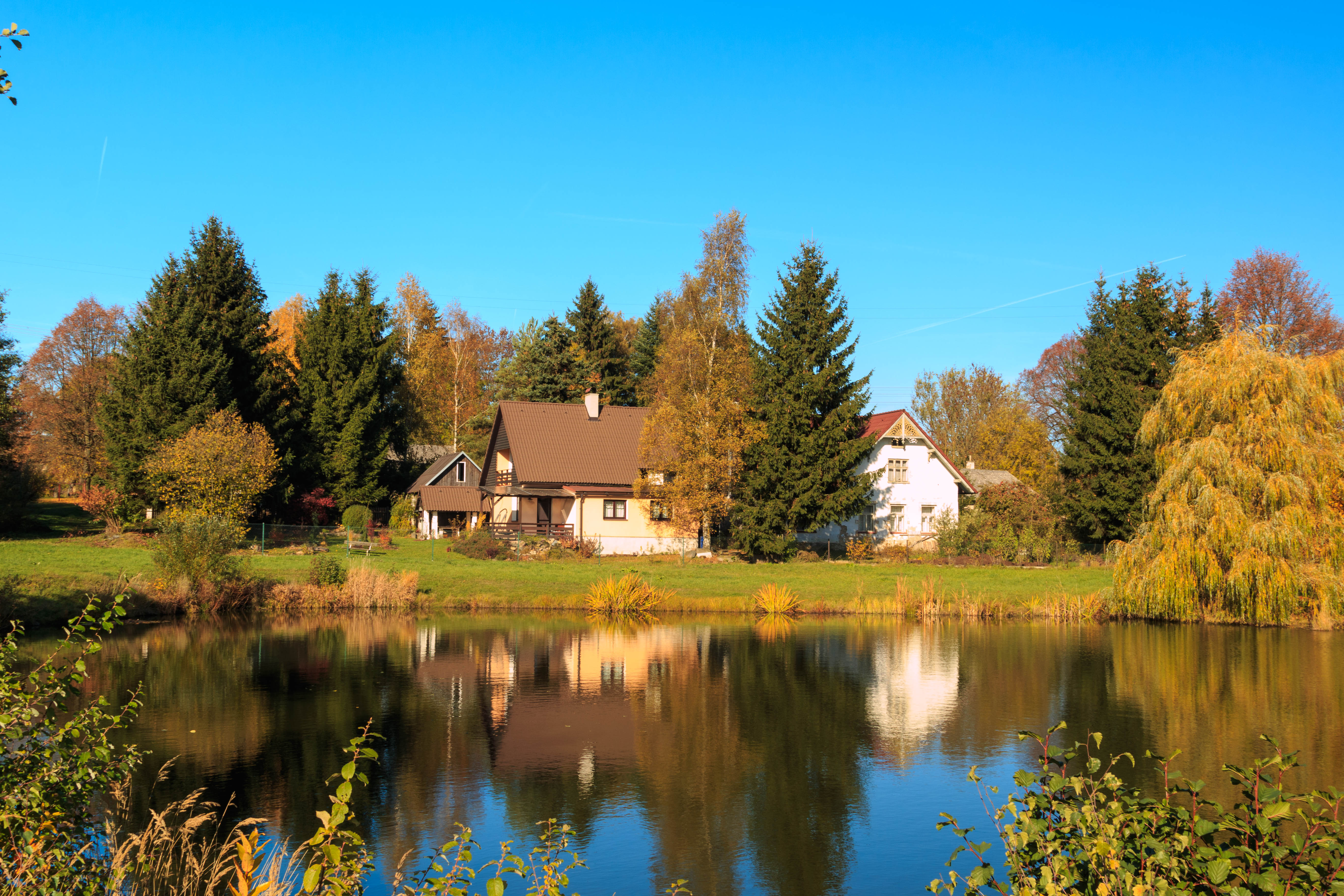 Kocourov rybník